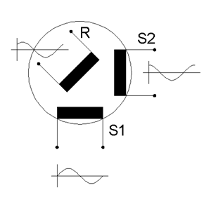 Prinzip des Resolvers (Winkelgeber)